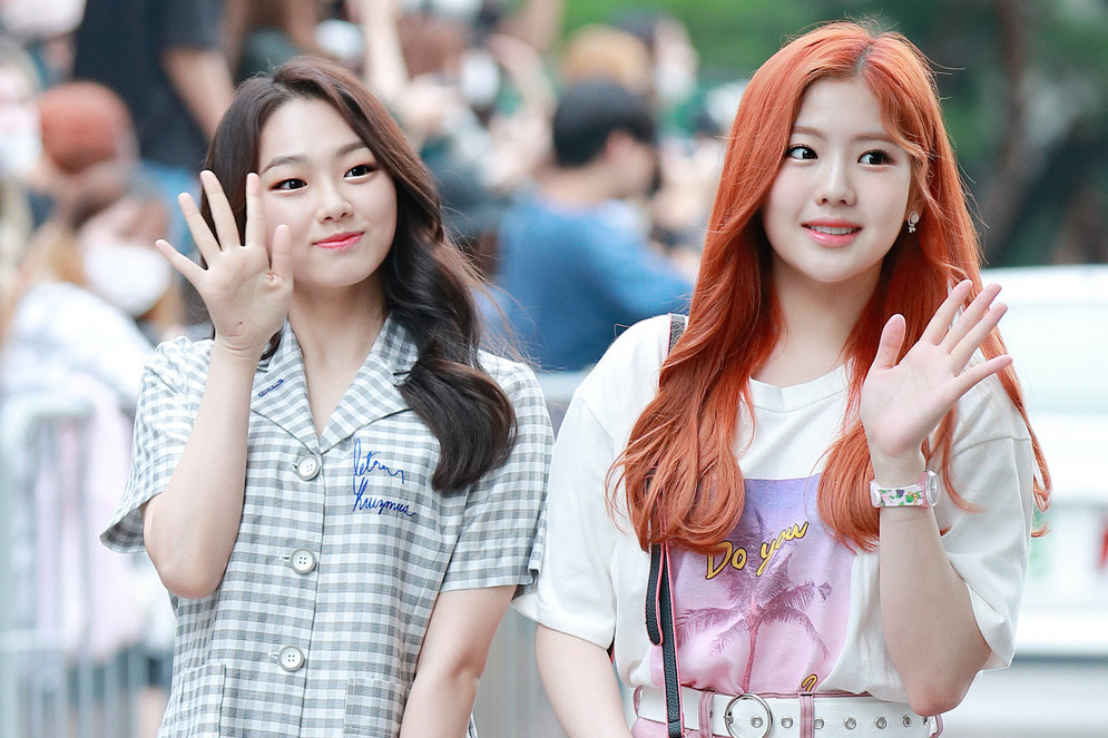 조선말: 170825 구구단 오구오구 뮤직뱅크 출근길